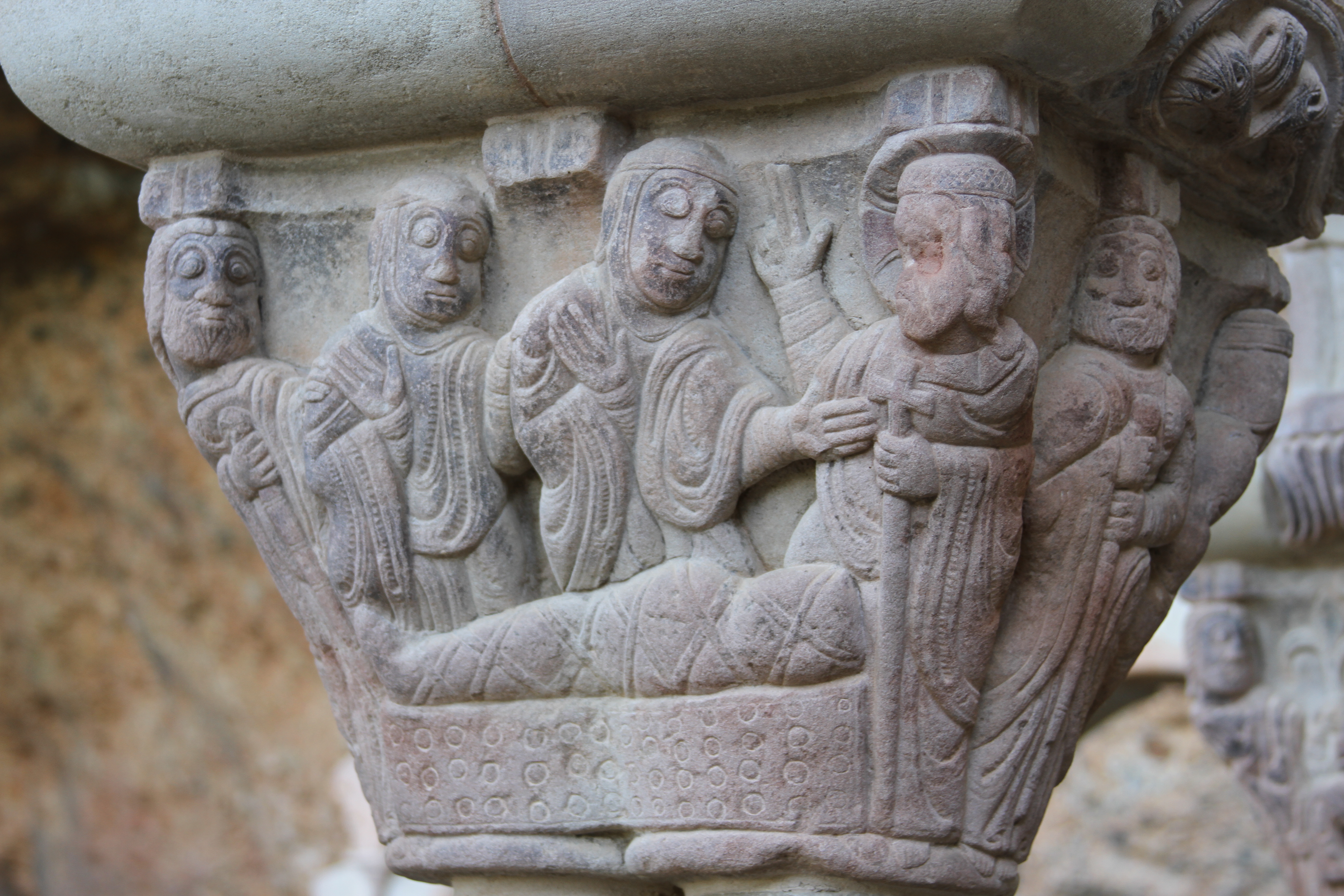 Monasterio Viejo de San Juan de la Peña, claustro, capitel románico, S. XII